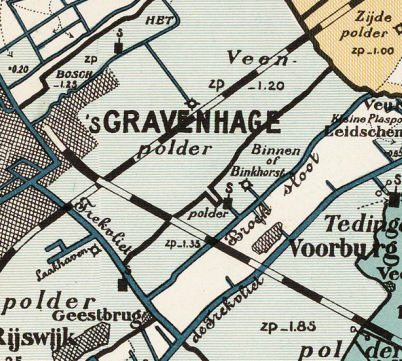 Binkhorstpolder